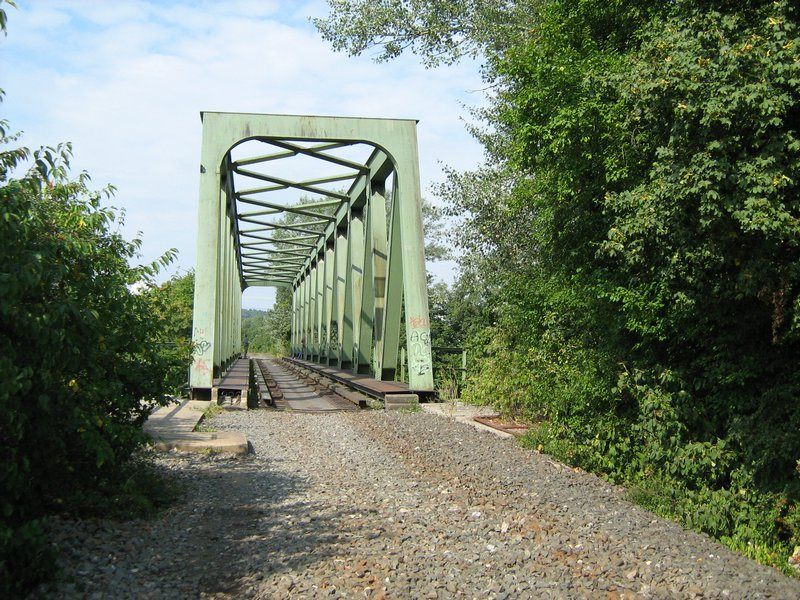 Brücke der stillgelegten Bahnstrecke Forchheim-Hemhofen über den Main-Donau-Kanal bei Forchheim